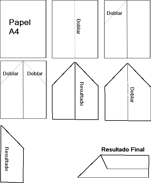 La imagen ha sido copiada de es::en:Image:Paper_plane_diagram.png y la modifiqué para quedara en español.